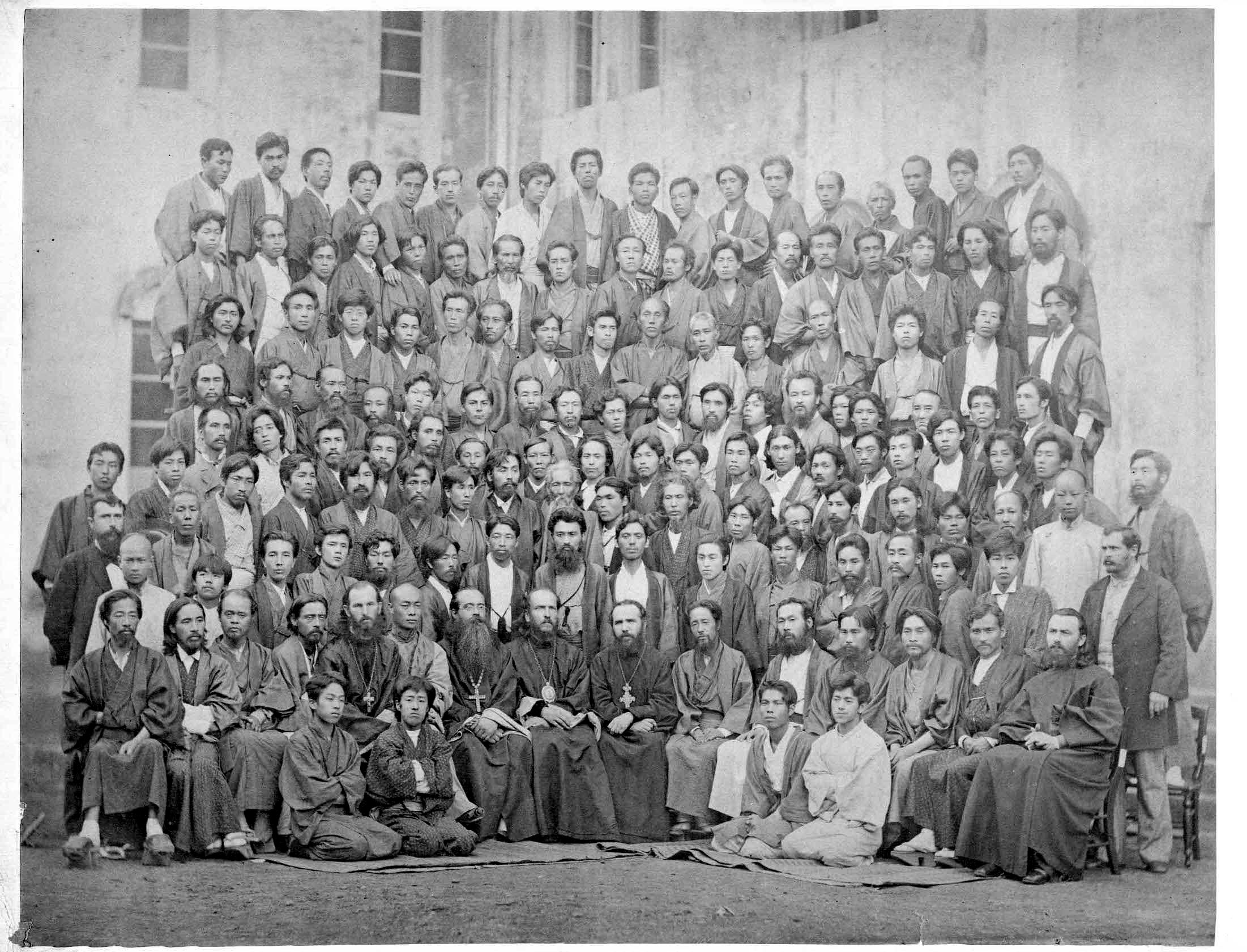 Собор Японской православной церкви в июле 1882 года, Токио